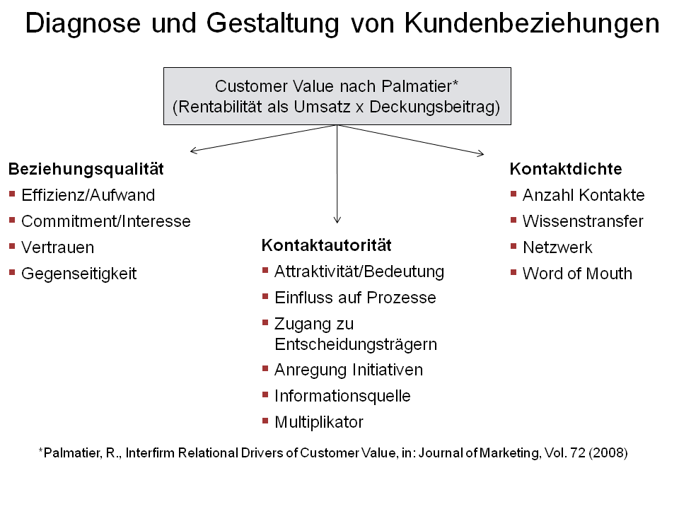 Diagnose und Gestaltung von Kundenbeziehungen